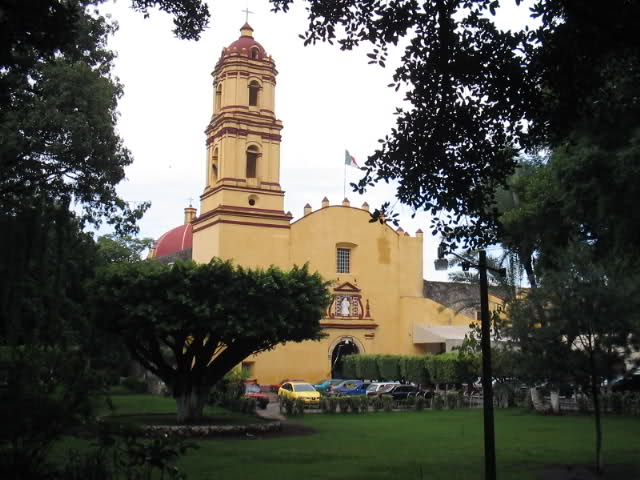 Iglesia de Santiago Apostol - Jiutepec